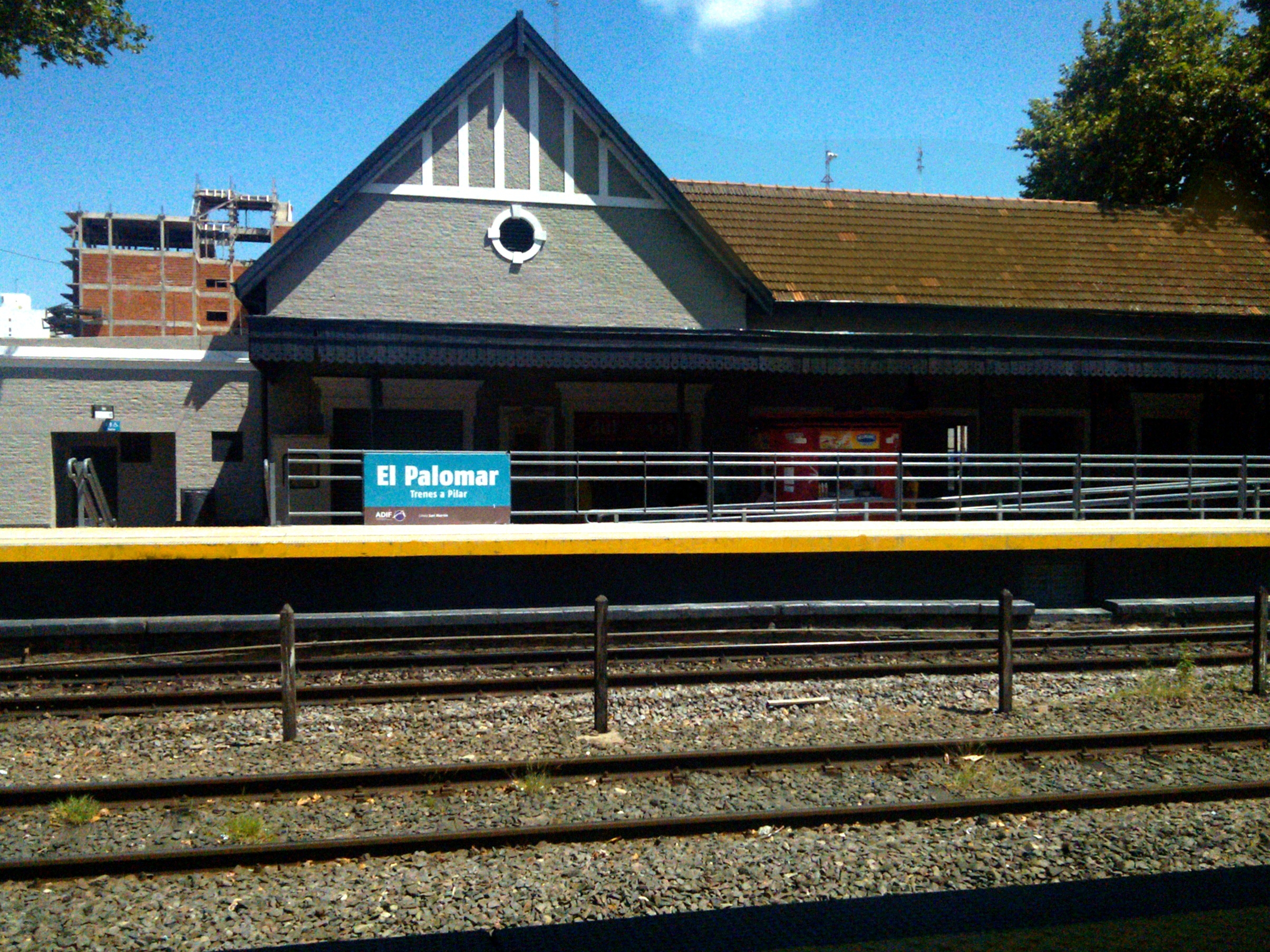 Imagen tomada desde el andén dos hacia el andén uno de la estación El Palomar, en Buenos Aires, Argentina.